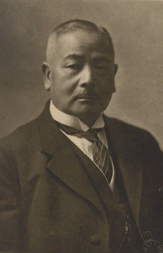 岩崎清七ポートレート